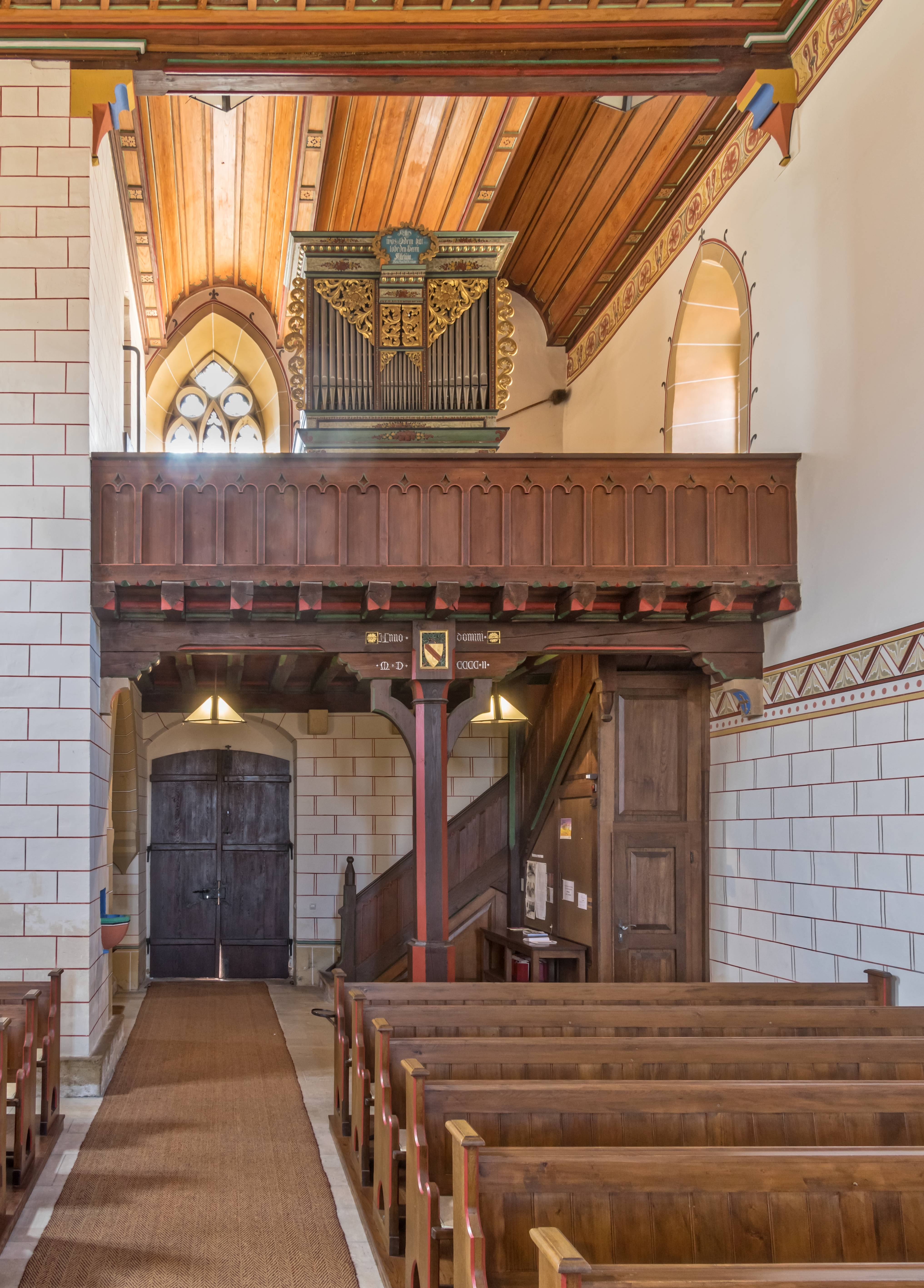 St. Aegidien in St. Ilgen einem Teilort von Laufen Blick zum Haupteingang mit Empore und Orgel. Der Zugang zur Kapelle ist links